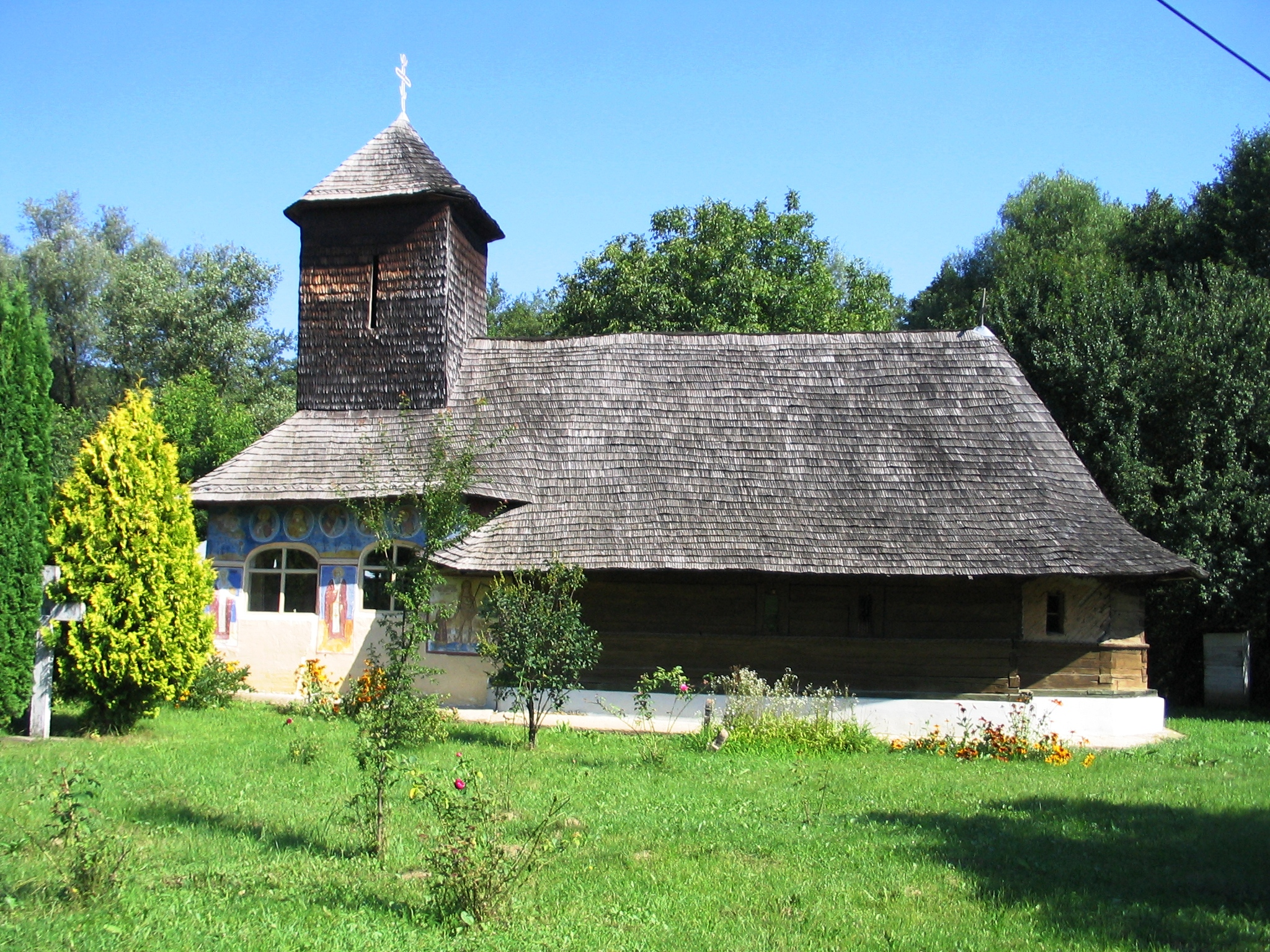 Biserica de lemn „Adormirea Maicii Domnului”